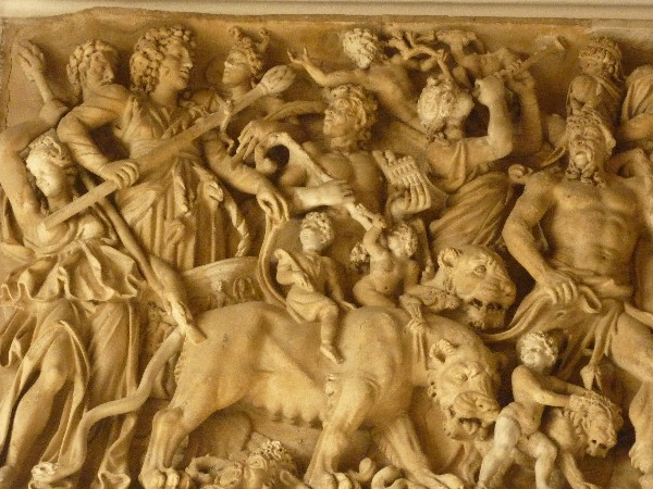 Sarcophage romain, Musée du Capitole, Rome